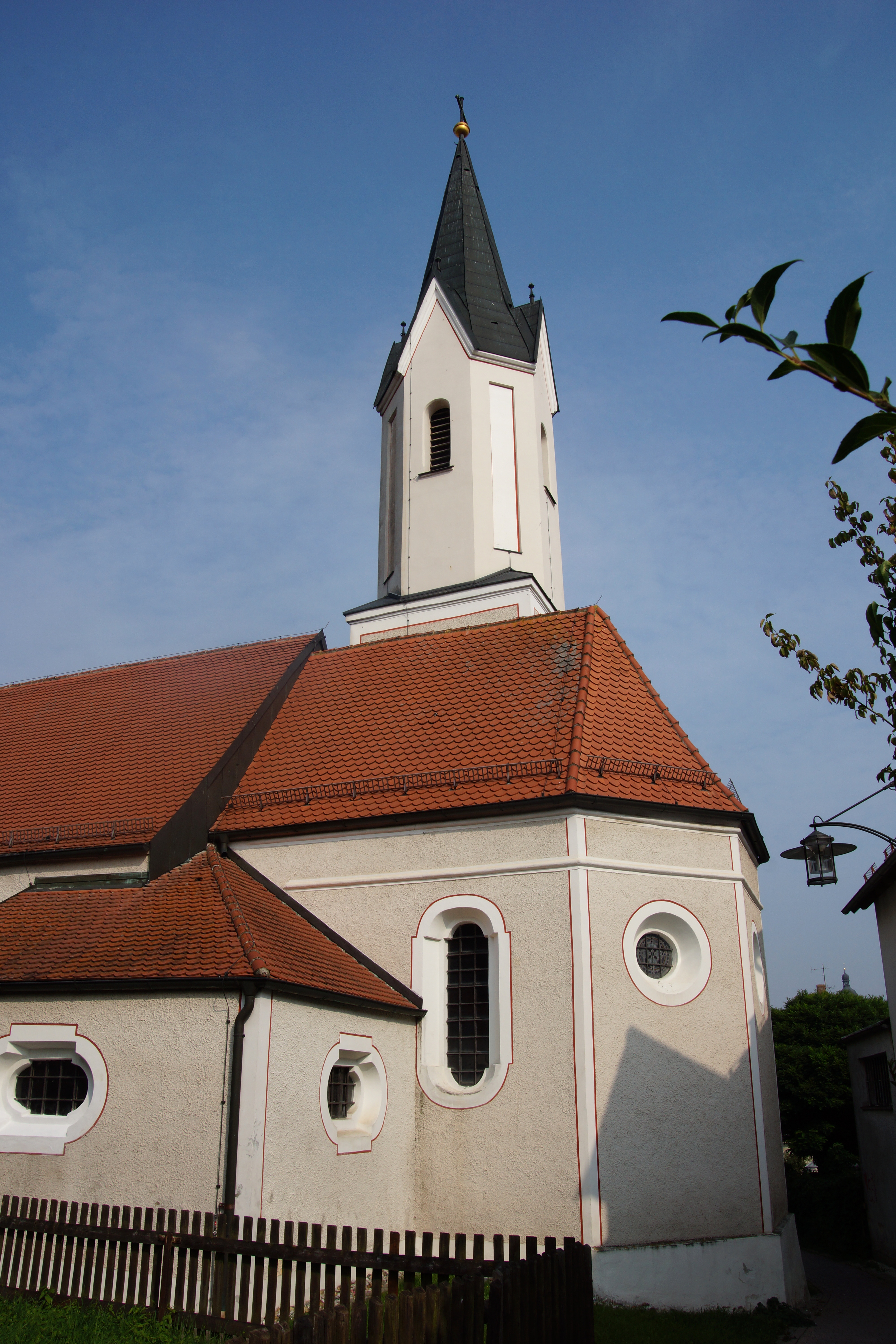 Die Filialkirche St. Nikolaus in Schierling bei Regensburg